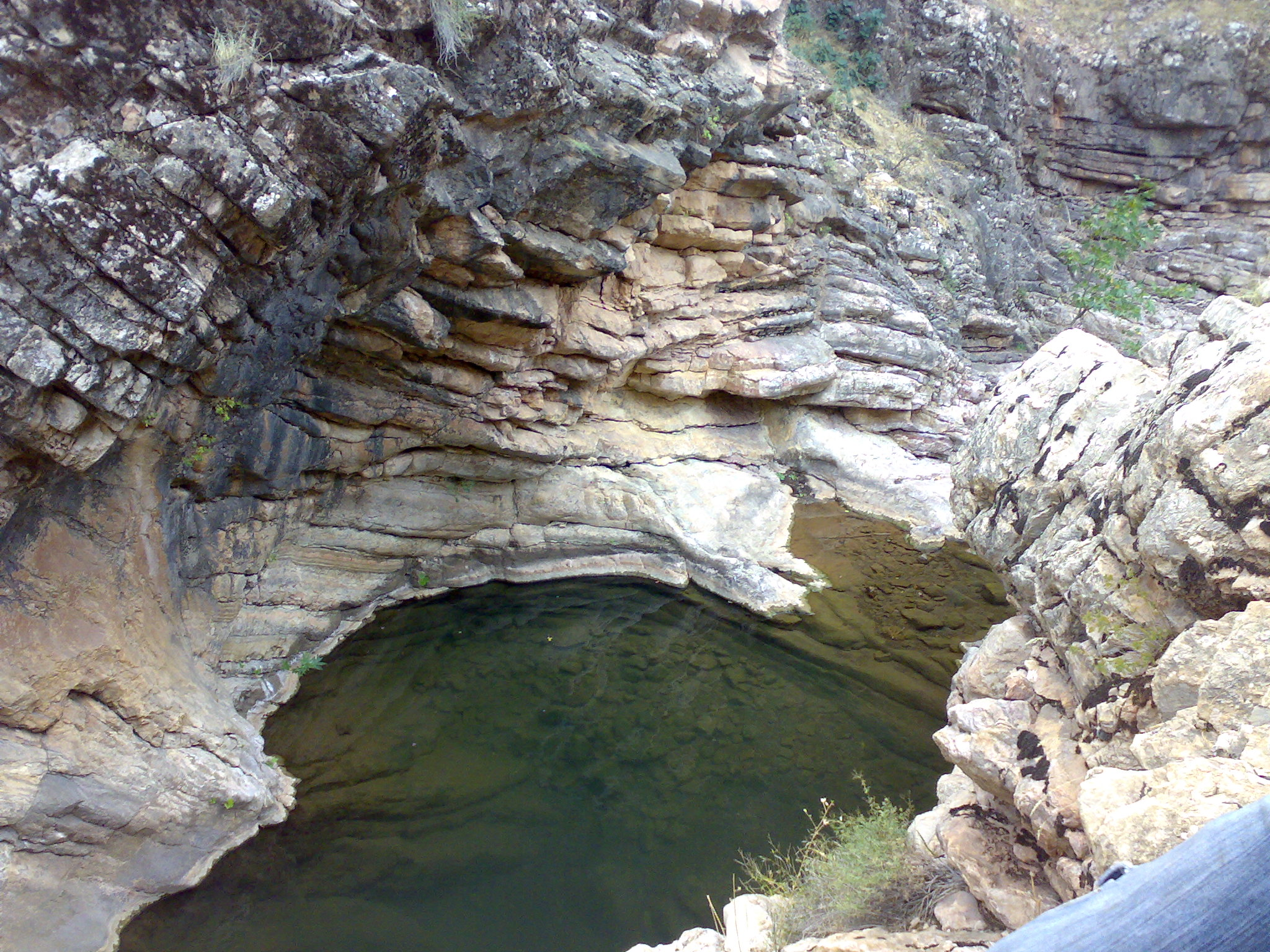 Adıyaman merkeze bağlı Sakallı köyünden bir görüntü.